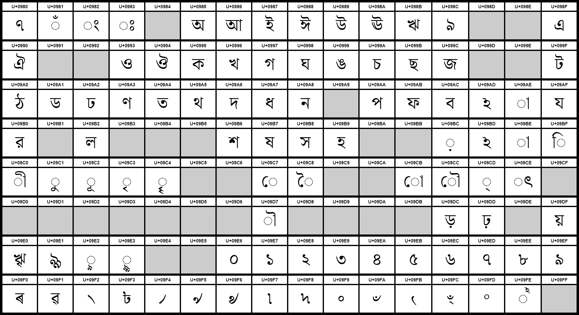 Grafiktafel für den Unicodeblock Bengalisch. Schraffierte Felder sind unbesetzte Codepoints.